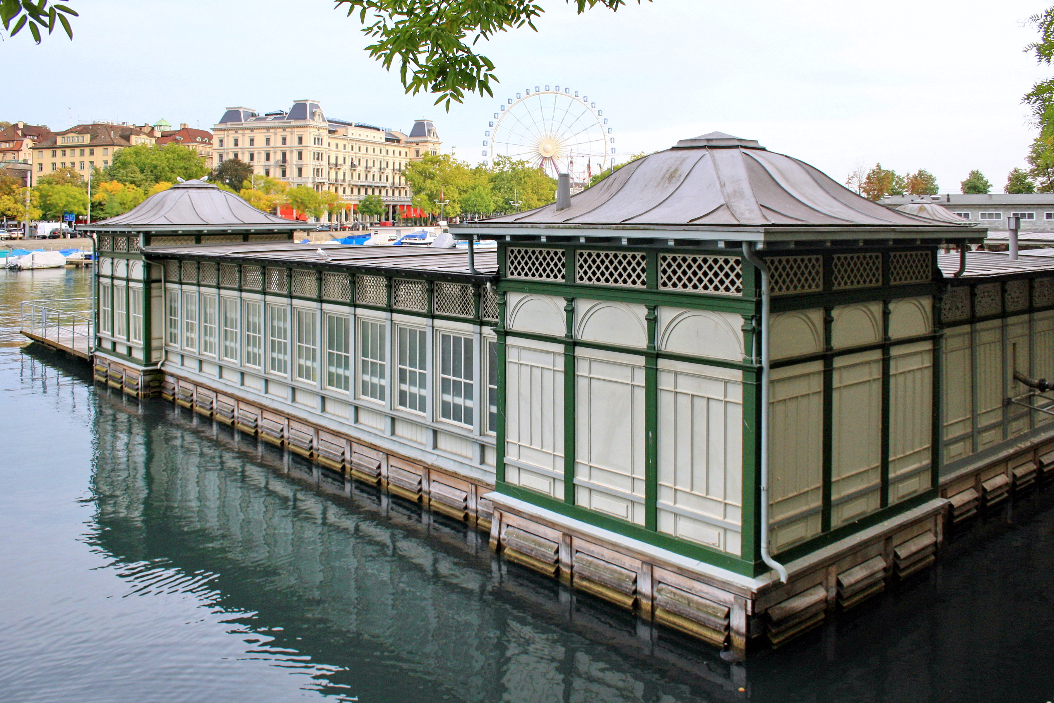 Frauenbadi in Zürich (Switzerland) as seen from Stadthausquai, Upper Limmatquai and Haus Bellevue in the background.